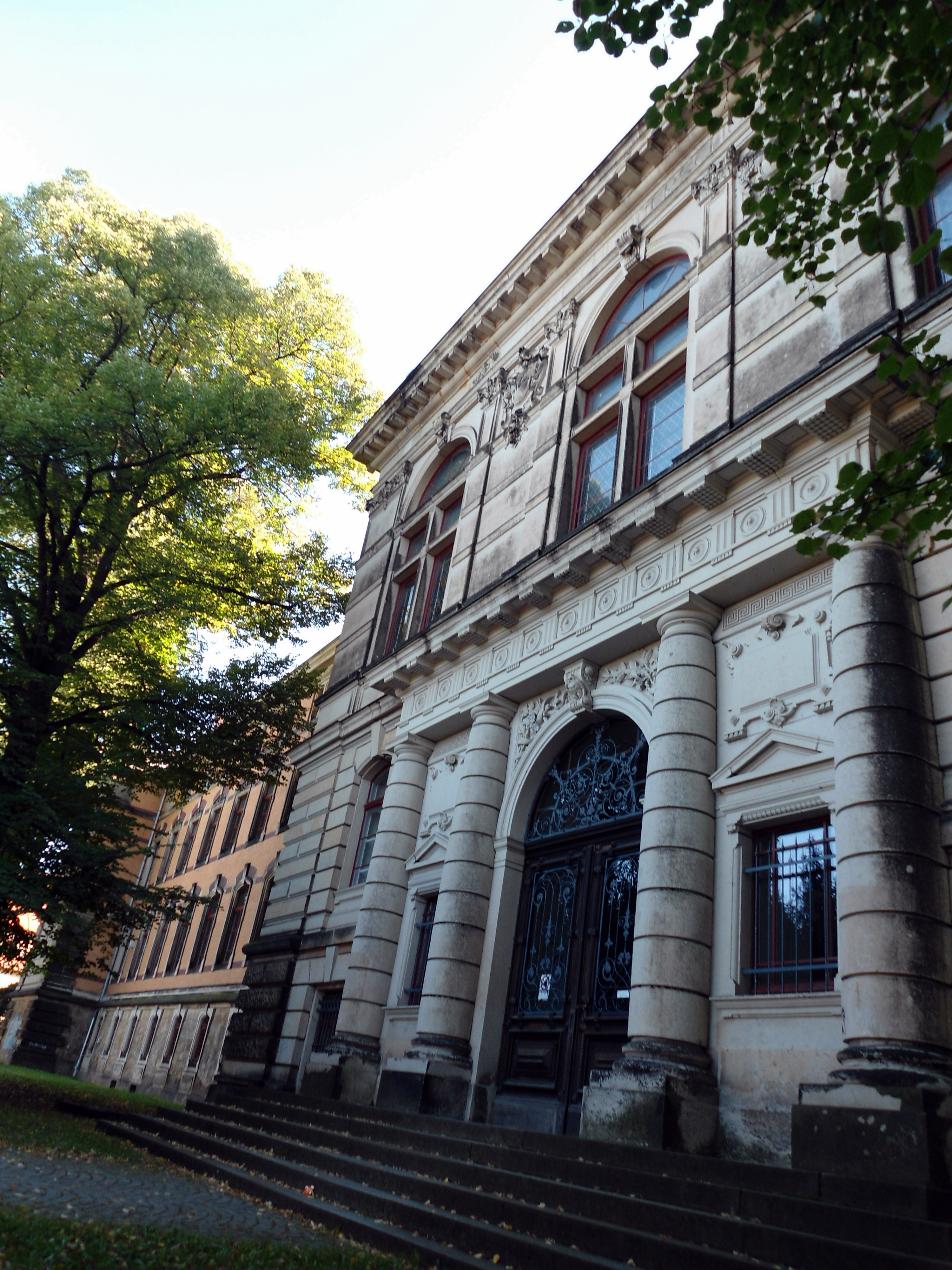 Gymnasium Dresden-Plauen auf der Kantstraße 2, 01187 Dresden, 51° 1′ 37,7″ N, 13° 42′ 18,1″ O